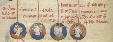 Toulouse, Bibliothèque municipale MS 450: Bernard Gui, De origine prima Francorum f 190r